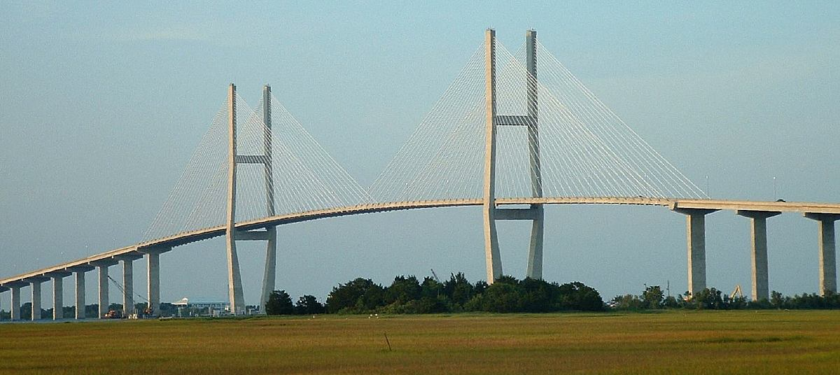 Sidney Lanier Bridge, Brunswick Georgia USA